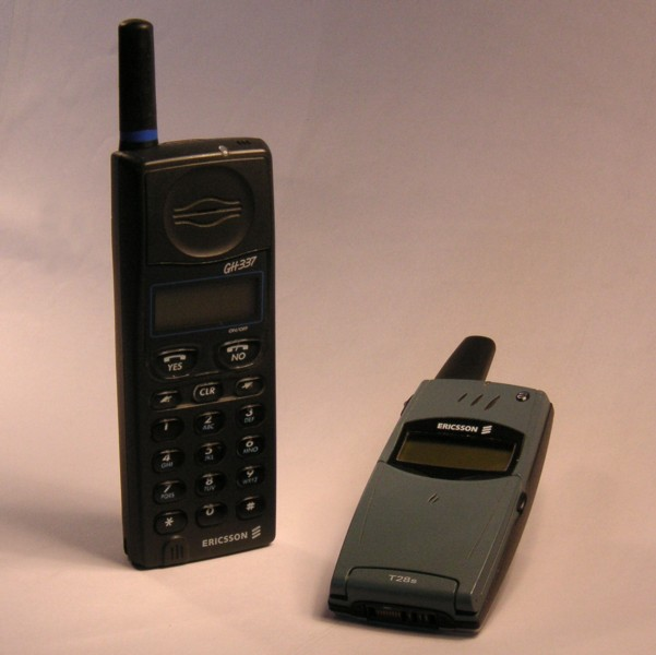 Ericssons erstes und eines der letzten selbst entwickelten GSM Mobiltelefon